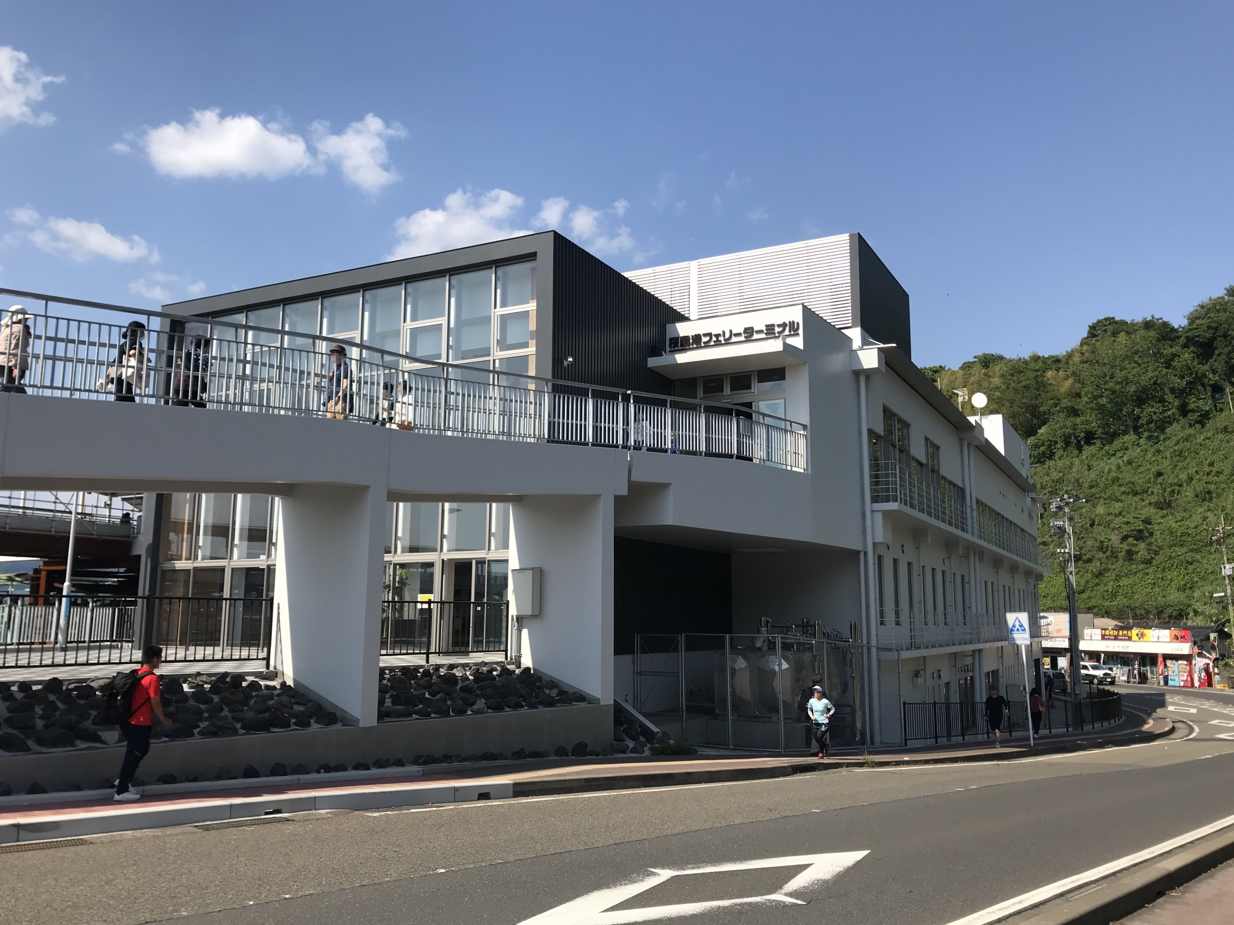 桜島港フェリーターミナル